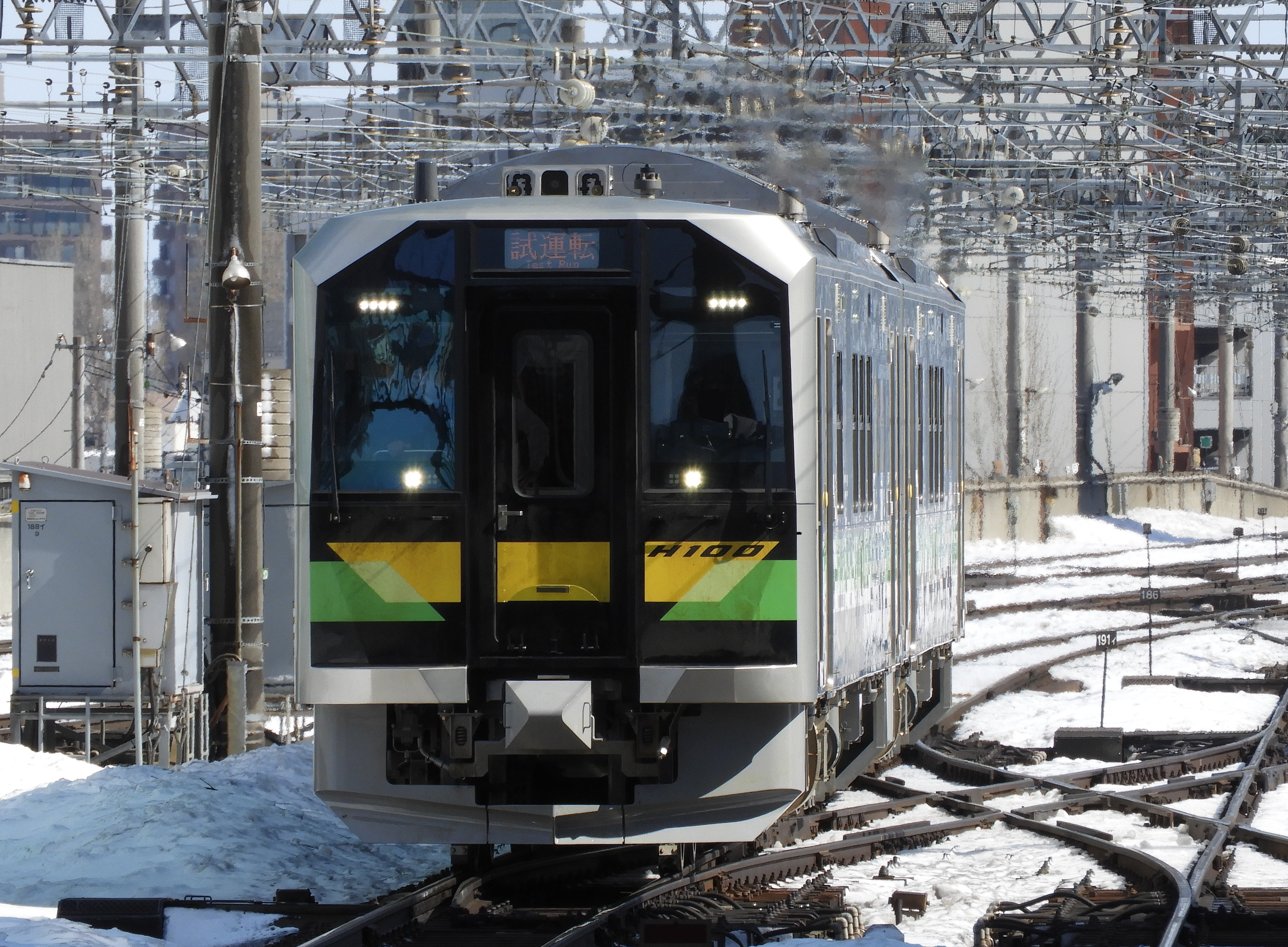 JR北海道 H100形の試運転写真です。